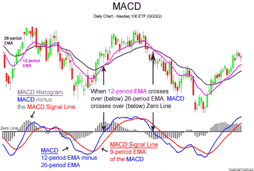 График MACD с параметрами 12, 26, 9